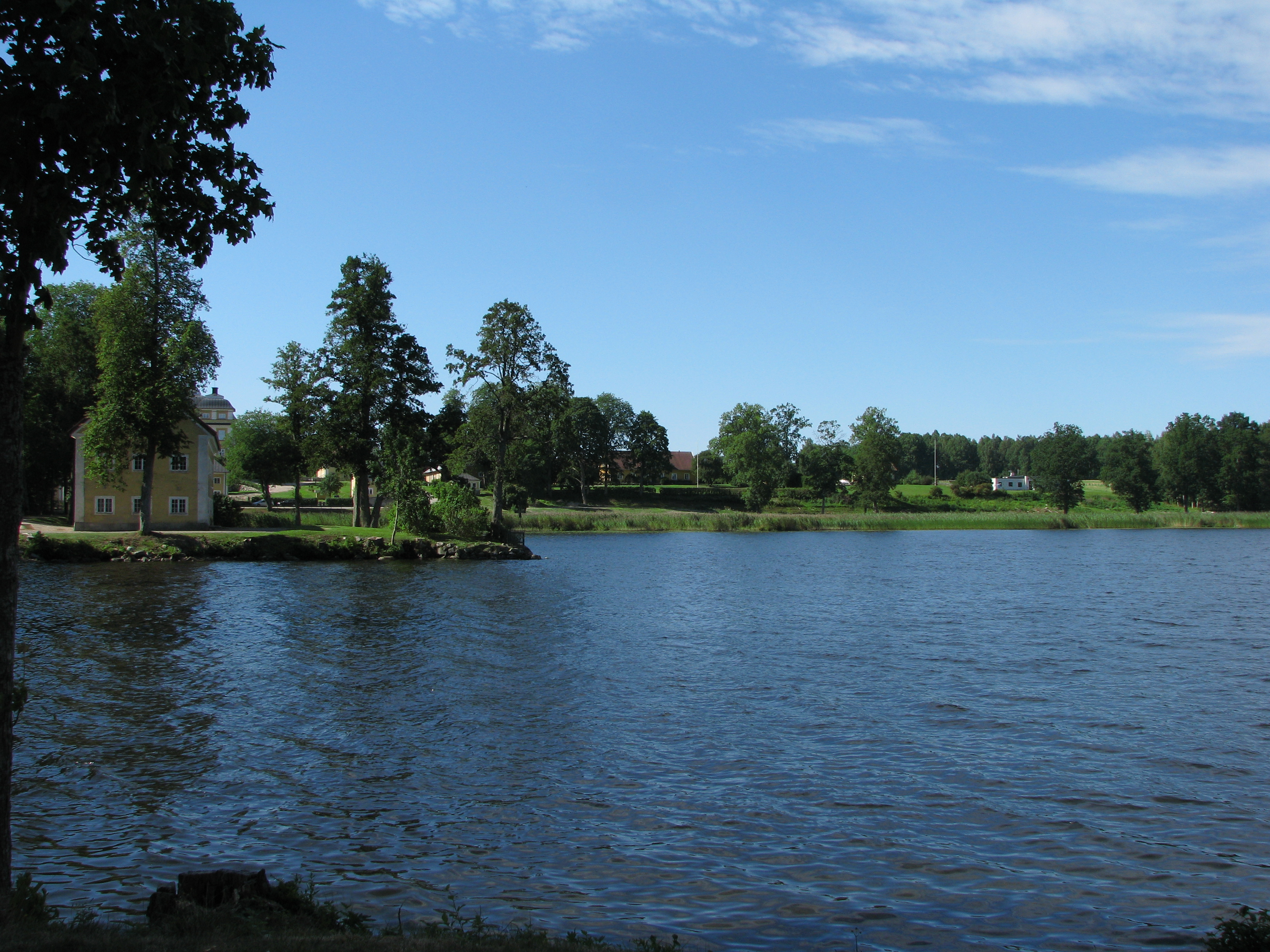 Eriksbergssjön fotograferad från Kvarn.